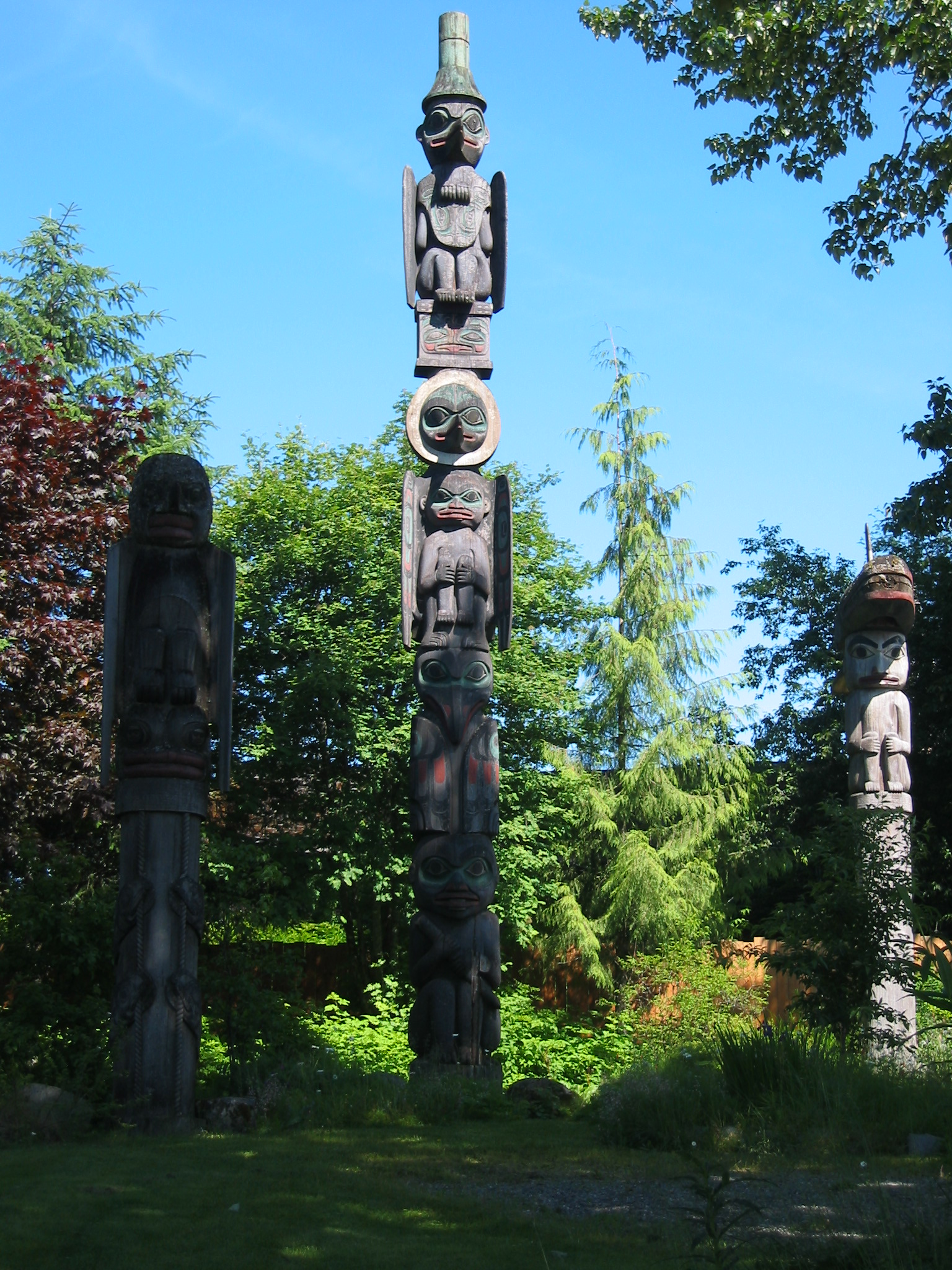 Raven pole, One-legged Fisherman pole, and Killer Whale pole in Wrangell, Alaska.